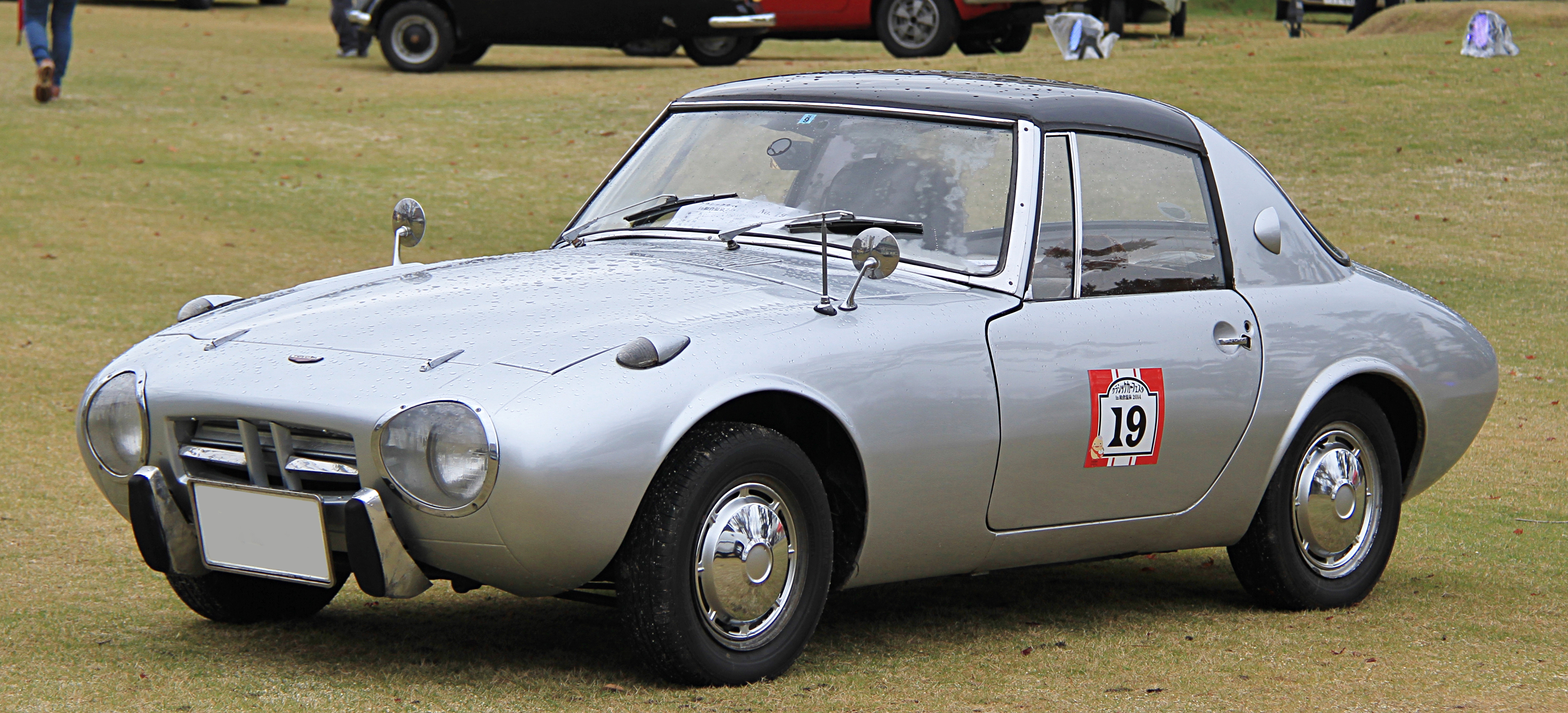 Toyota Sports 800